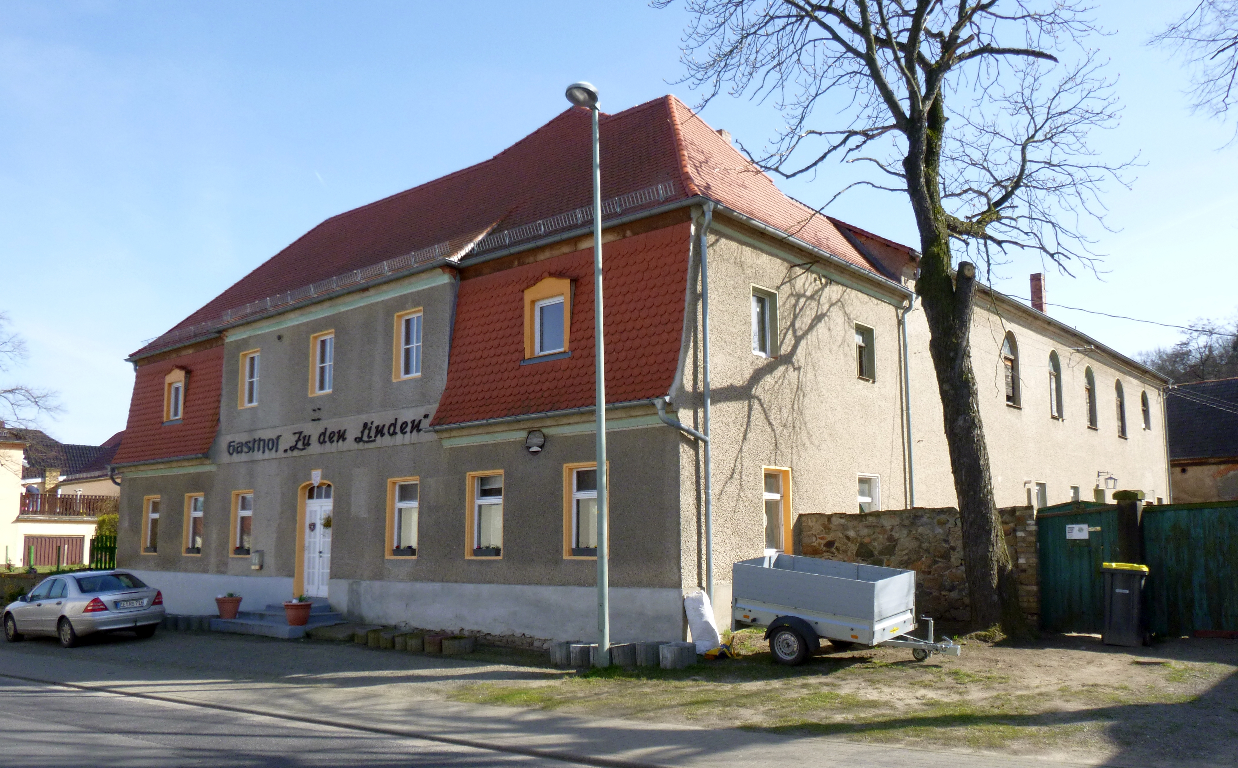 Gaststätte „Rautenstrauchs Erben“ und ehemaliger Gasthof Unter den Linden in Gröden (Brandenburg)